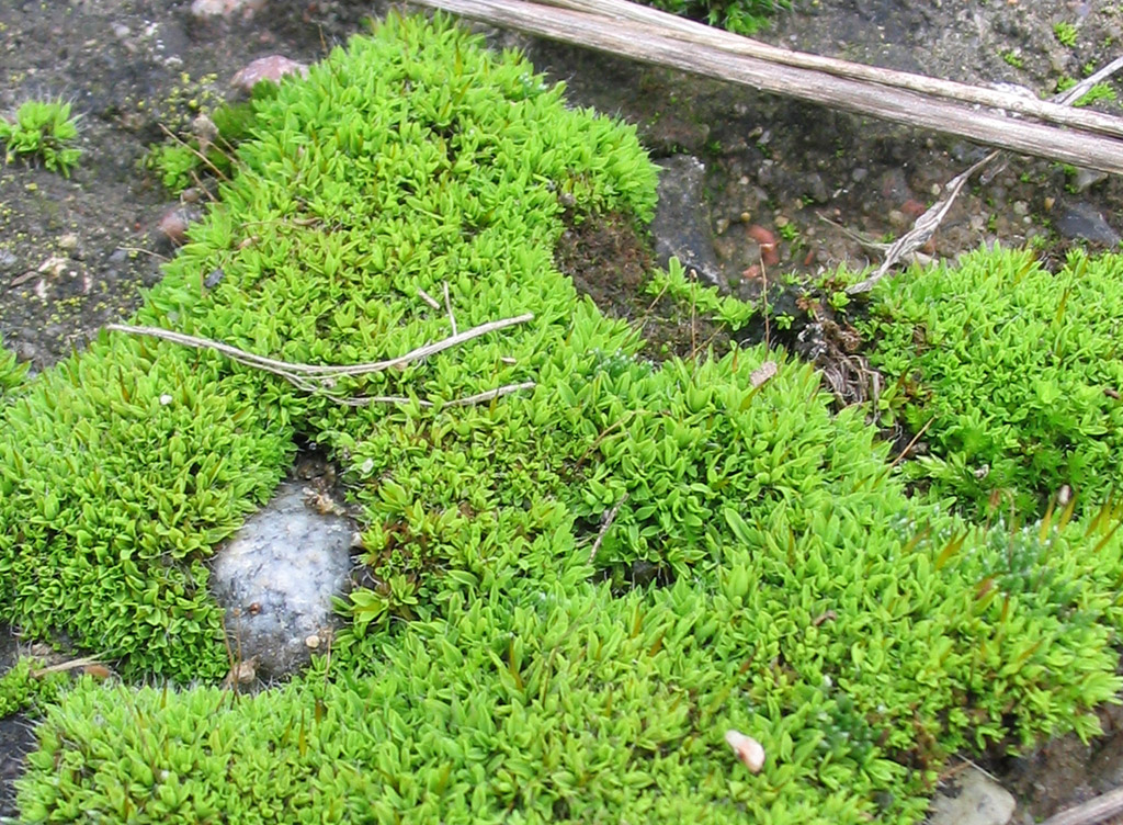 Beschreibung: Drehzahnmoos (Tortula muralis) Fotograf: Darkone, 3. November 2004